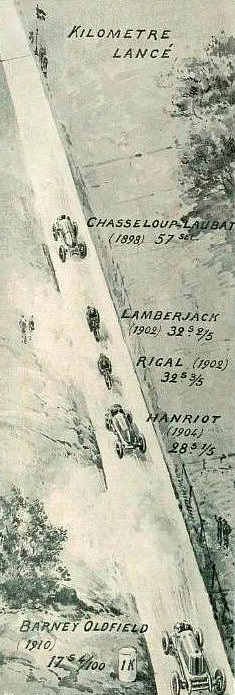 Meilleurs temps terrestres sur le kilomètre lancé jusqu'au premier conflit mondial, à deux et quatre roues.